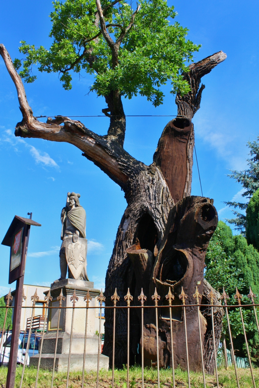 Stochov